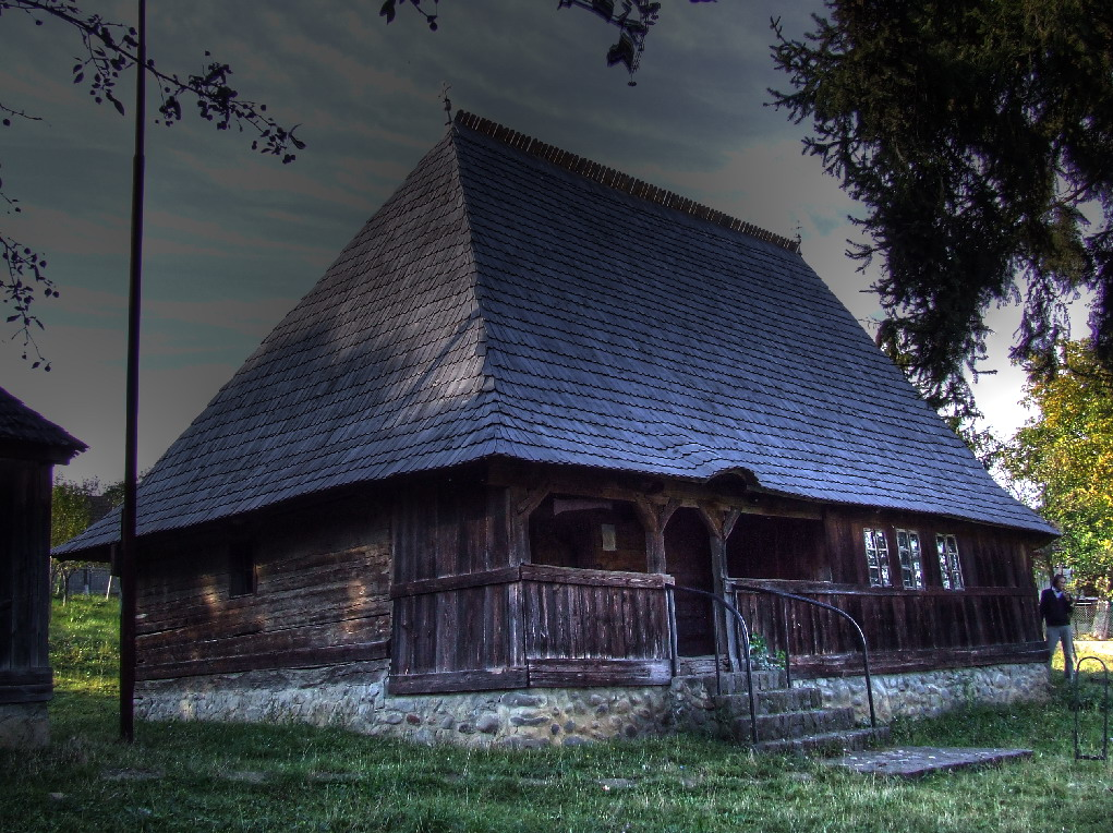 Biserica de lemn din Sărmăşel, judeţul Mureş. Vedere din sud.